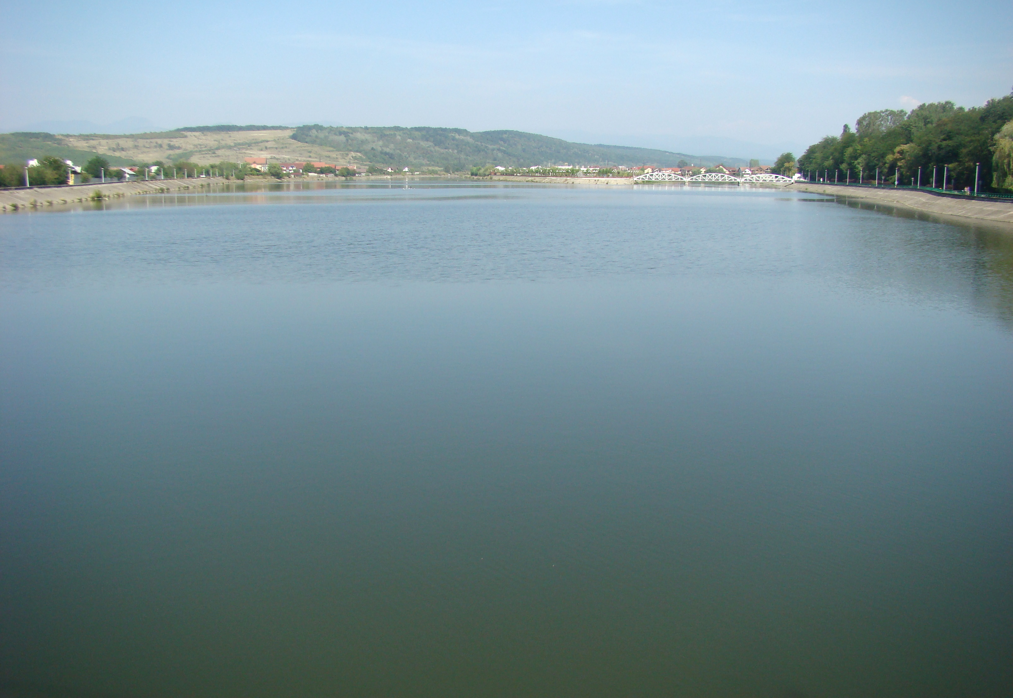 Râul Jiu în oraşul Târgu Jiu